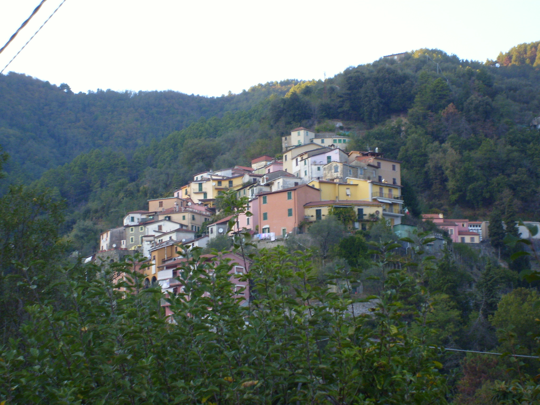 ho sbagliato immagine help!! da cancellare